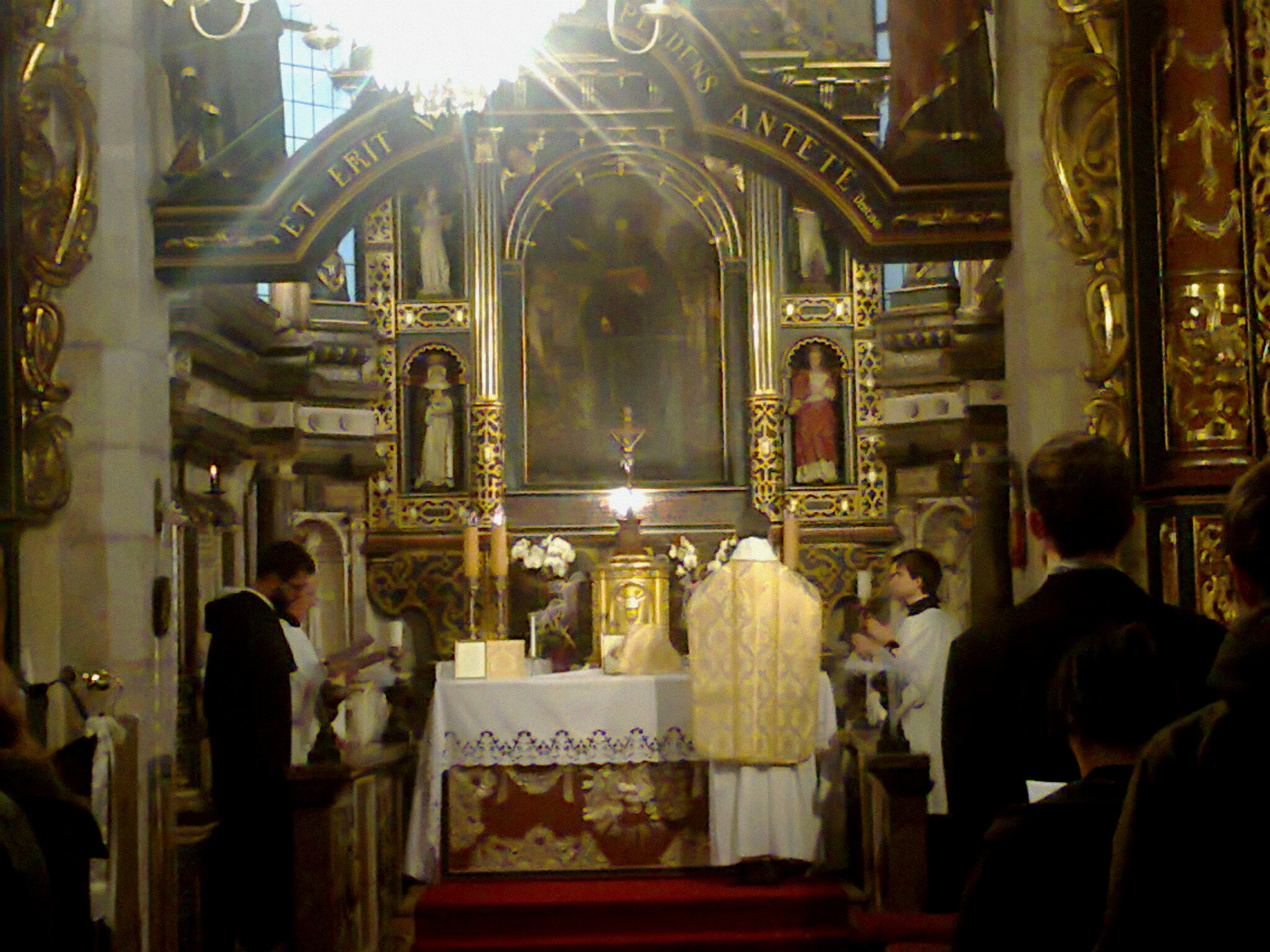 Ryt Dominikański